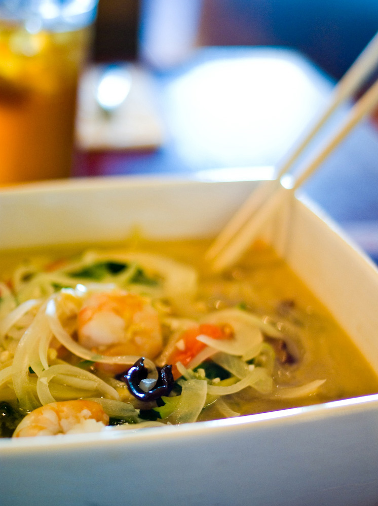 @ Mandarin House, Auburn/Opelika, AL